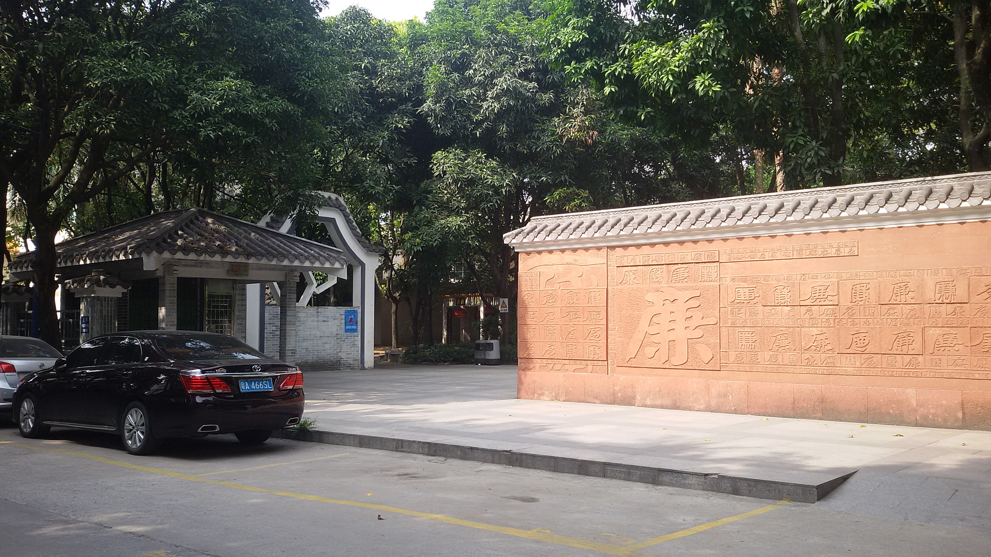 粵語: 龍洞村體育廣場